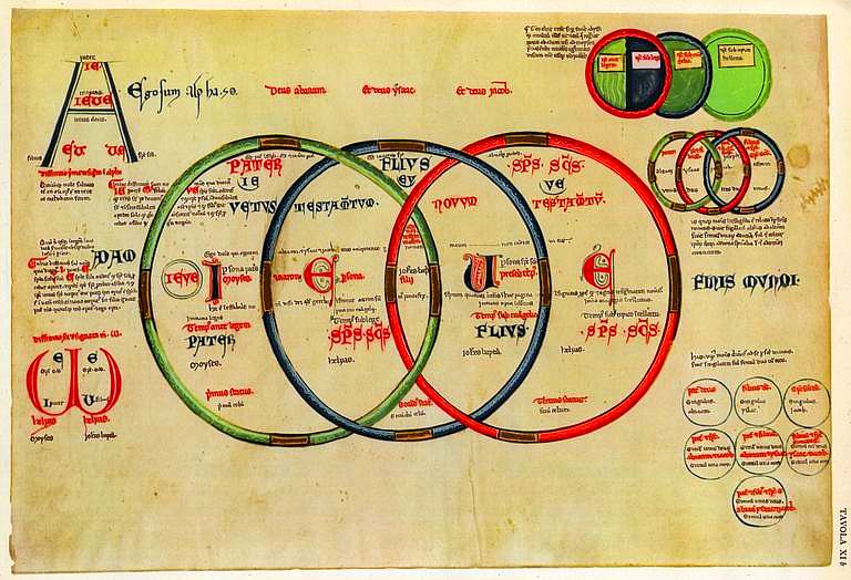 Tabla XIb del manuscrito "Liber Figurarum", "Libro de las Figuras" del Abad Joaquin de Fiore(1135-1202) simbolizando en tres círculos la "Santísima Trinidad". El círculo de color verde simboliza al "Padre", el círculo de color azul simboliza al "Hijo",el círculo de color rojo simboliza al "Espíritu Santo". Las Cuatro Letras "IEVE", trasnscripción en latín del divino "Tetragrammaton", hacen referencia a: La "I" al "Padre", la "V" al "Hijo" y la "E" al "Espíritu Santo". La duplicidad de la "E" corresponde a que "El Espíritu Santo" procede del "Padre" y del "Hijo".